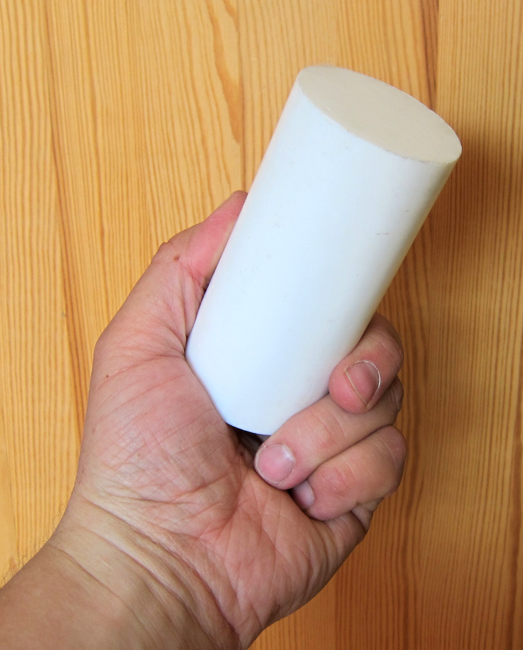 Teflona cilindrs